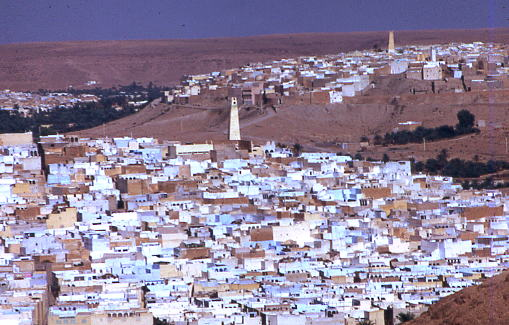 Ghardaïa, Algérie